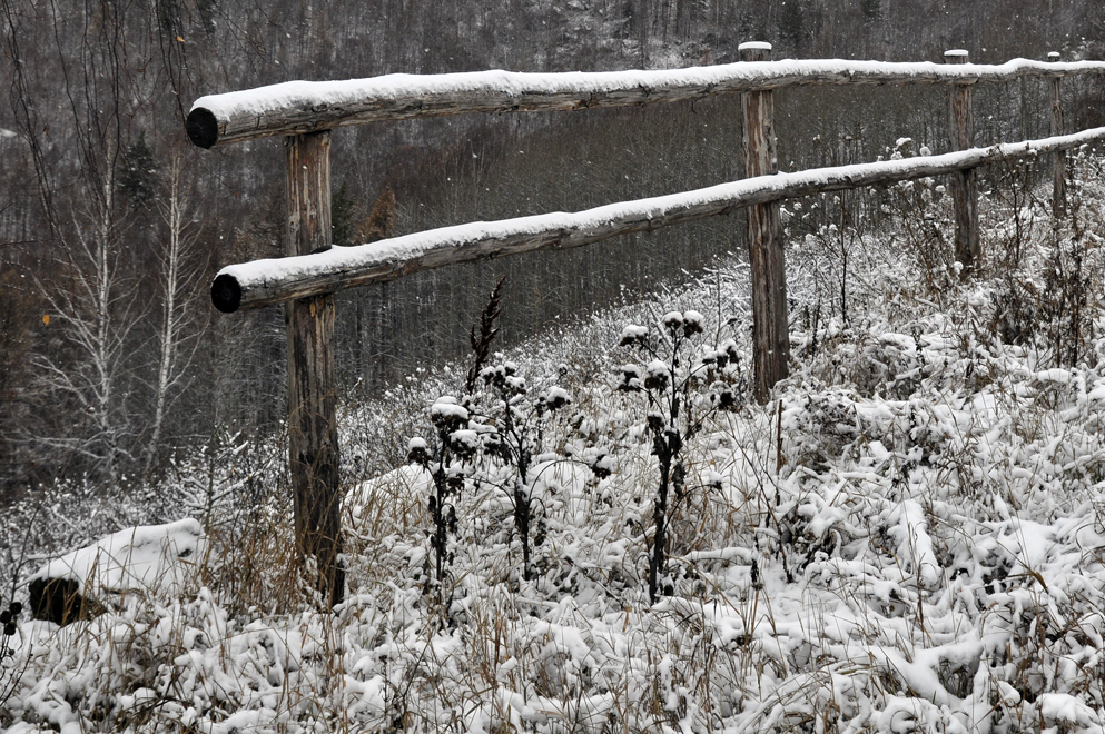 Abzakovo